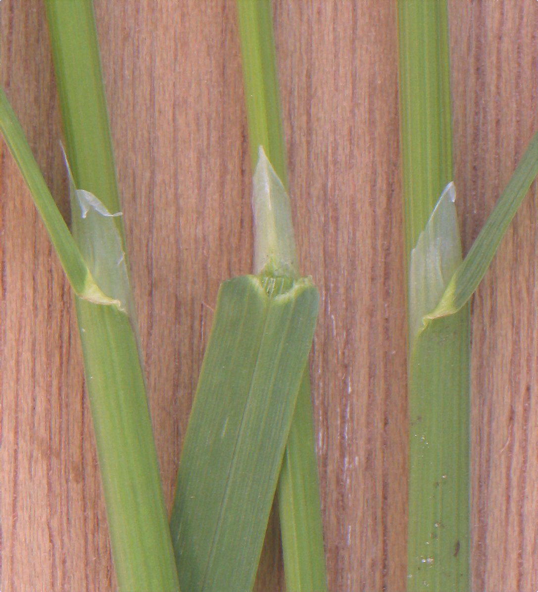 (Ruwbeemdgras) Poa trivialis ligula